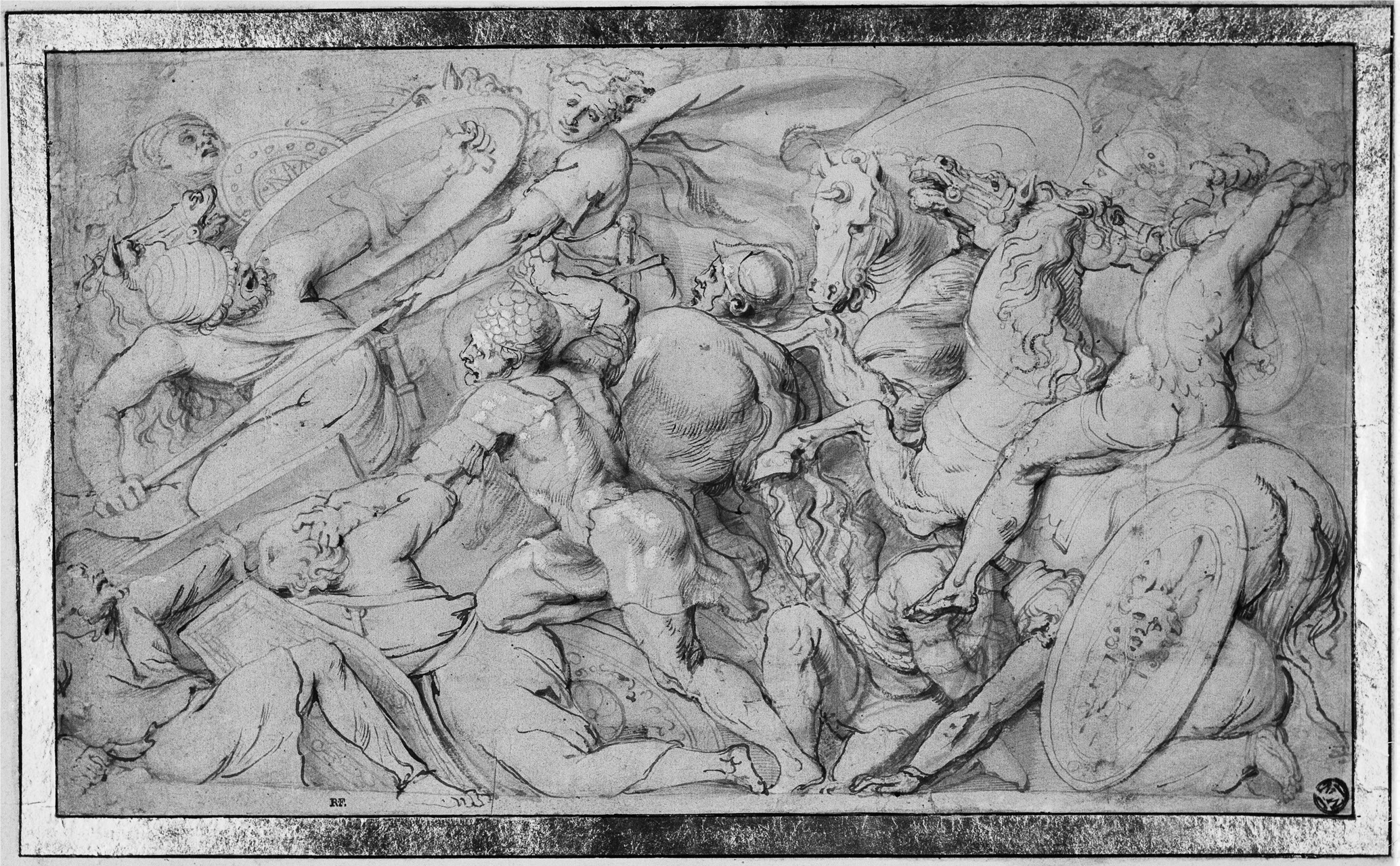 Scena di battaglia. Disegno attribuito alla cerchia di Polidoro da Caravaggio. Il disegno appartenne a Rubens che lo ritoccò personalmente